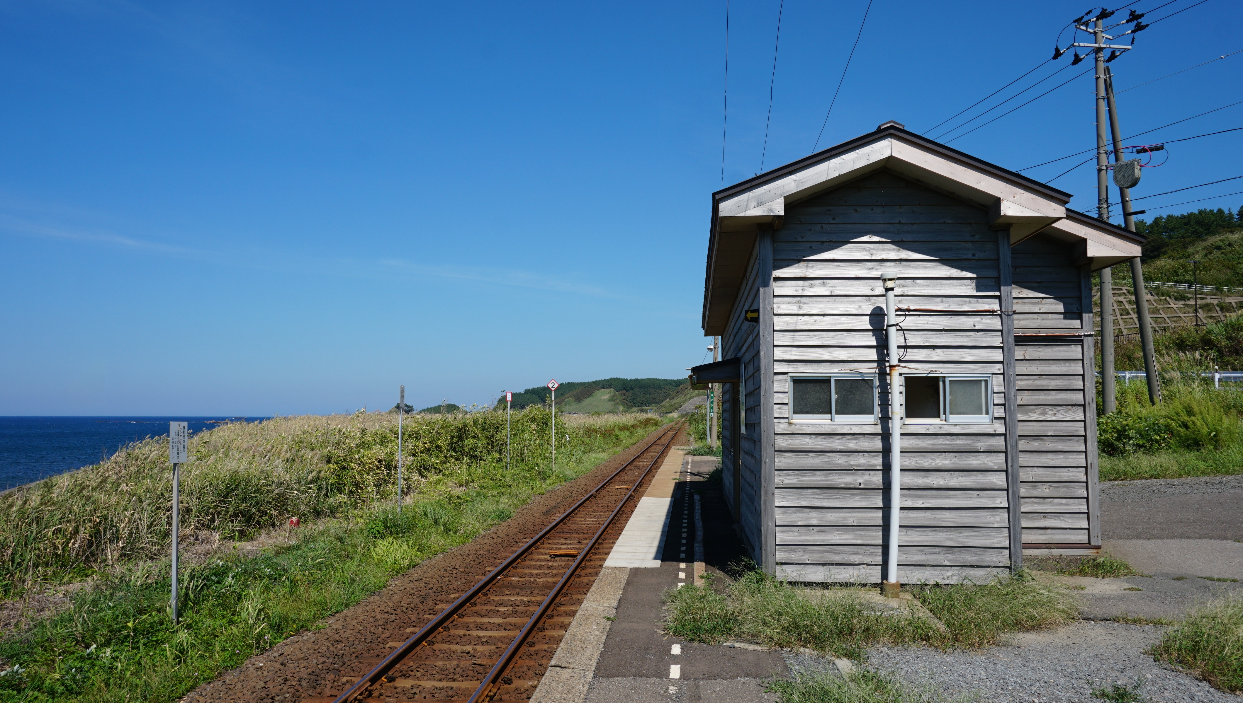 五能線・驫木駅プラットホームにて